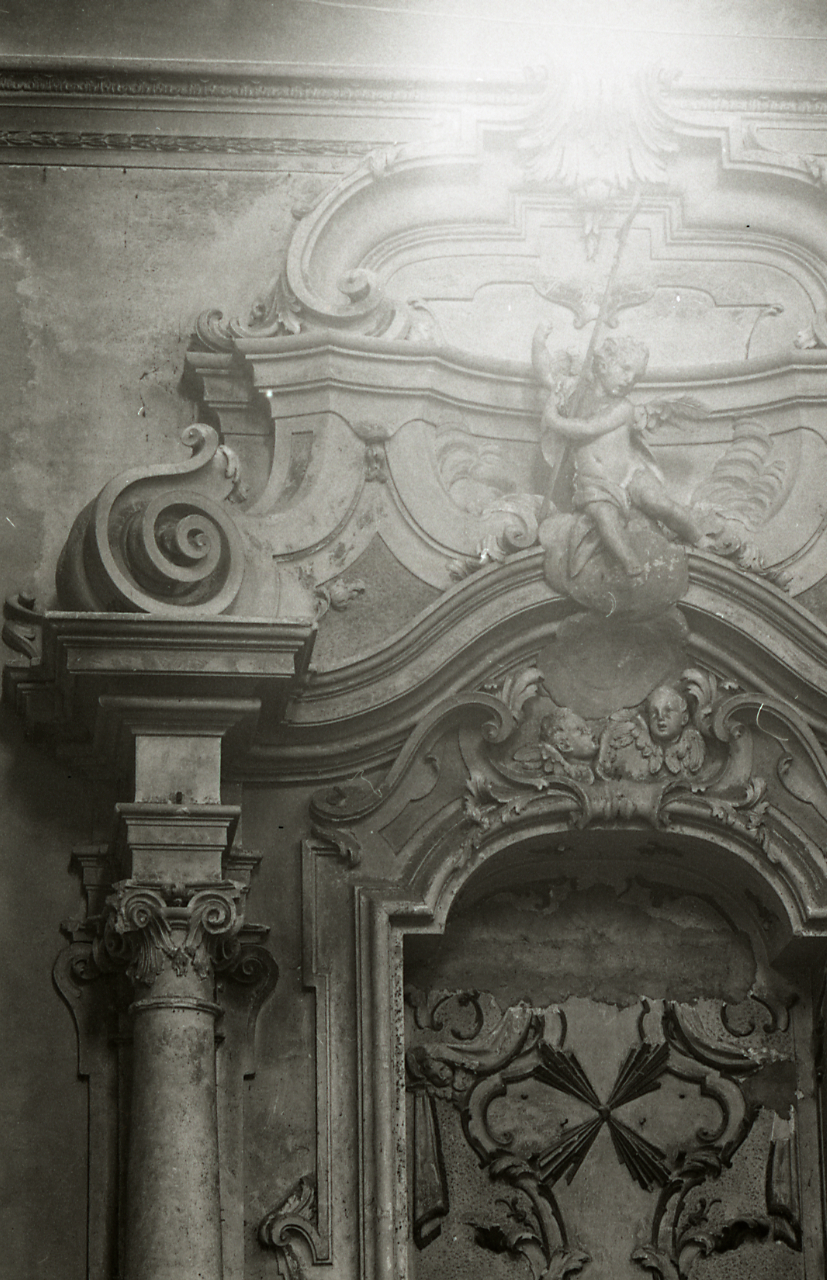 Servizio fotografico : Medicina, 1980 / Paolo Monti. - Strisce: 6, Fotogrammi complessivi: 30 : Negativo b/n, gelatina bromuro d'argento/ pellicola ; 35 mm. - ((Sul portanegativi: N[I]K[MA]T FP4. - La serie è identificata da Monti con segni grafici e distinta dalla successiva. - Confronta scheda 3487Lpbn01-30. - Occasione: Documentazione per la costituzione Catalogo didattico Beni Regionali (su ordinazione del Professor Andrea Emiliani). - Fonte: Agenda di Paolo Monti: Nikon Leika 3001-/ Monti 1978 (1978-1982), presso Archivio Paolo Monti. - Fonte: Fattura di Paolo Monti: IV. Commesse/ Fattura n. 51/ Legge n. 28 - città di Medicina (1980/11/29), presso Archivio Paolo Monti. N. 40 stampe formato 18x24 da negativi di Archivio